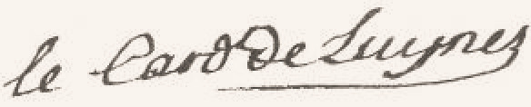 Signature du cardinal